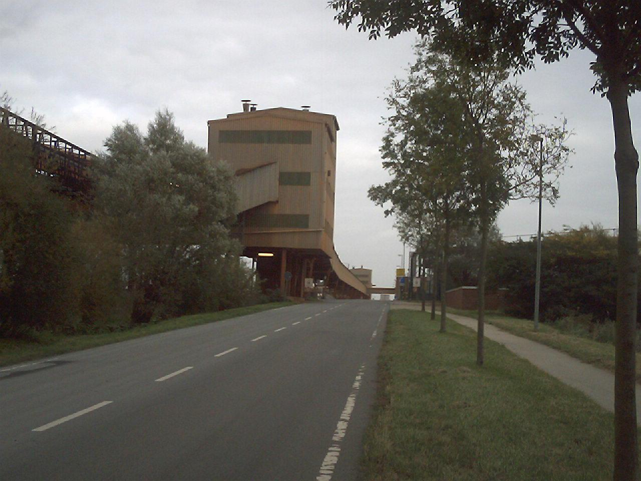 Bützflether Industriehafeneinfahrt